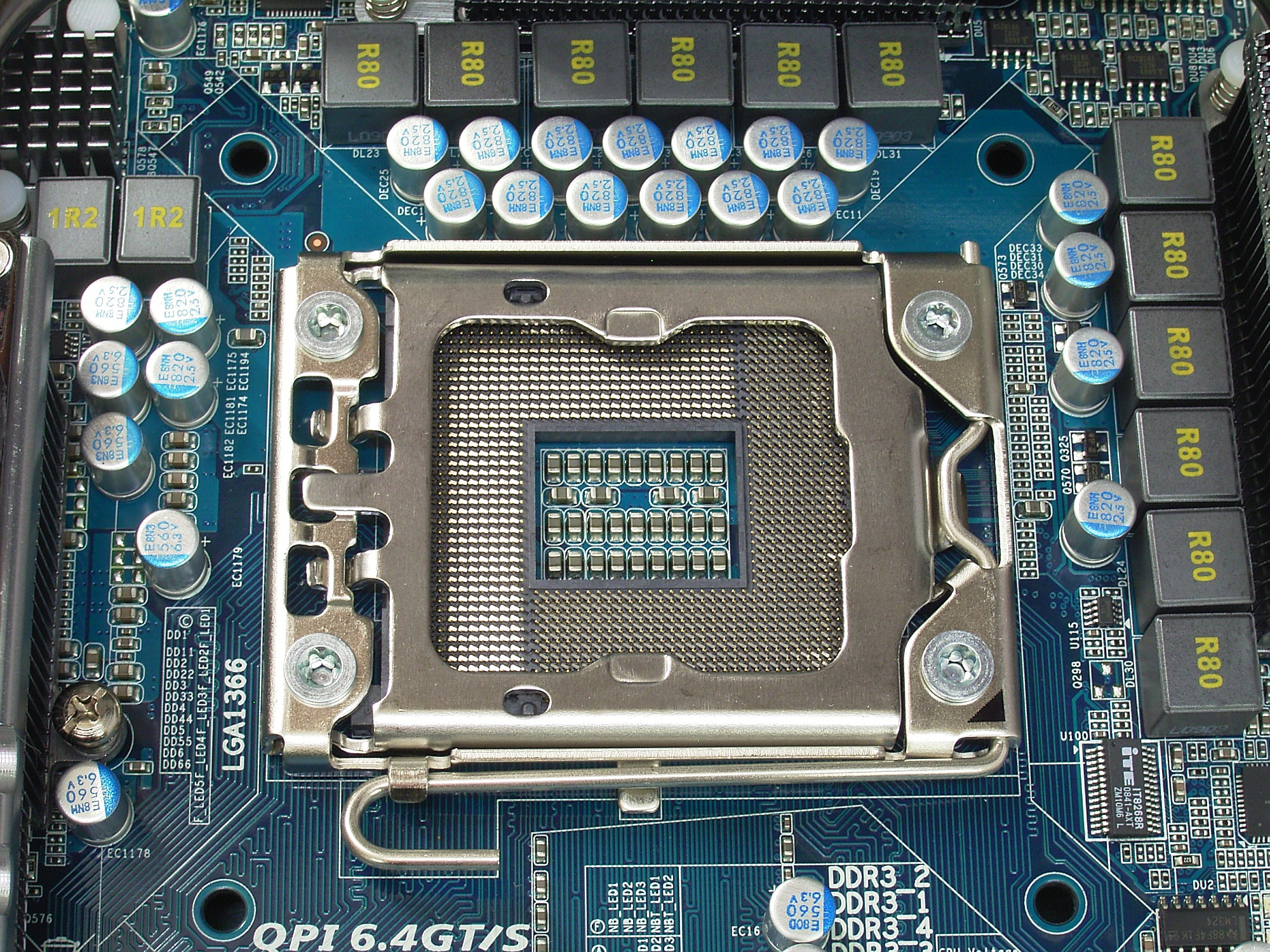 Socket LGA 1366, ohne Schutzabdeckung, Halterung geschlossen